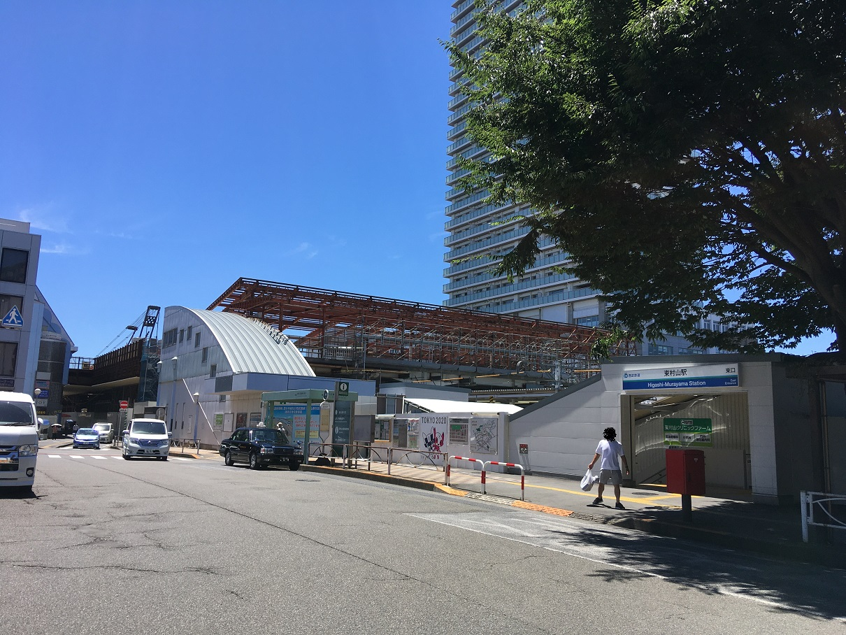 高架工事中の東村山駅東口駅舎